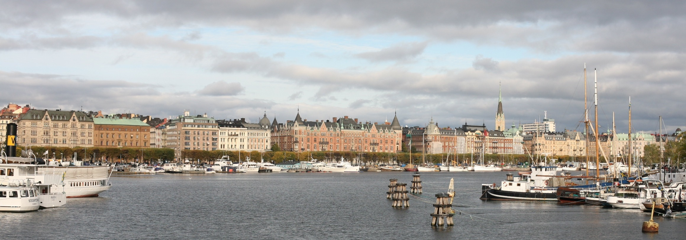 Strandvägen från Skeppsholmsbron